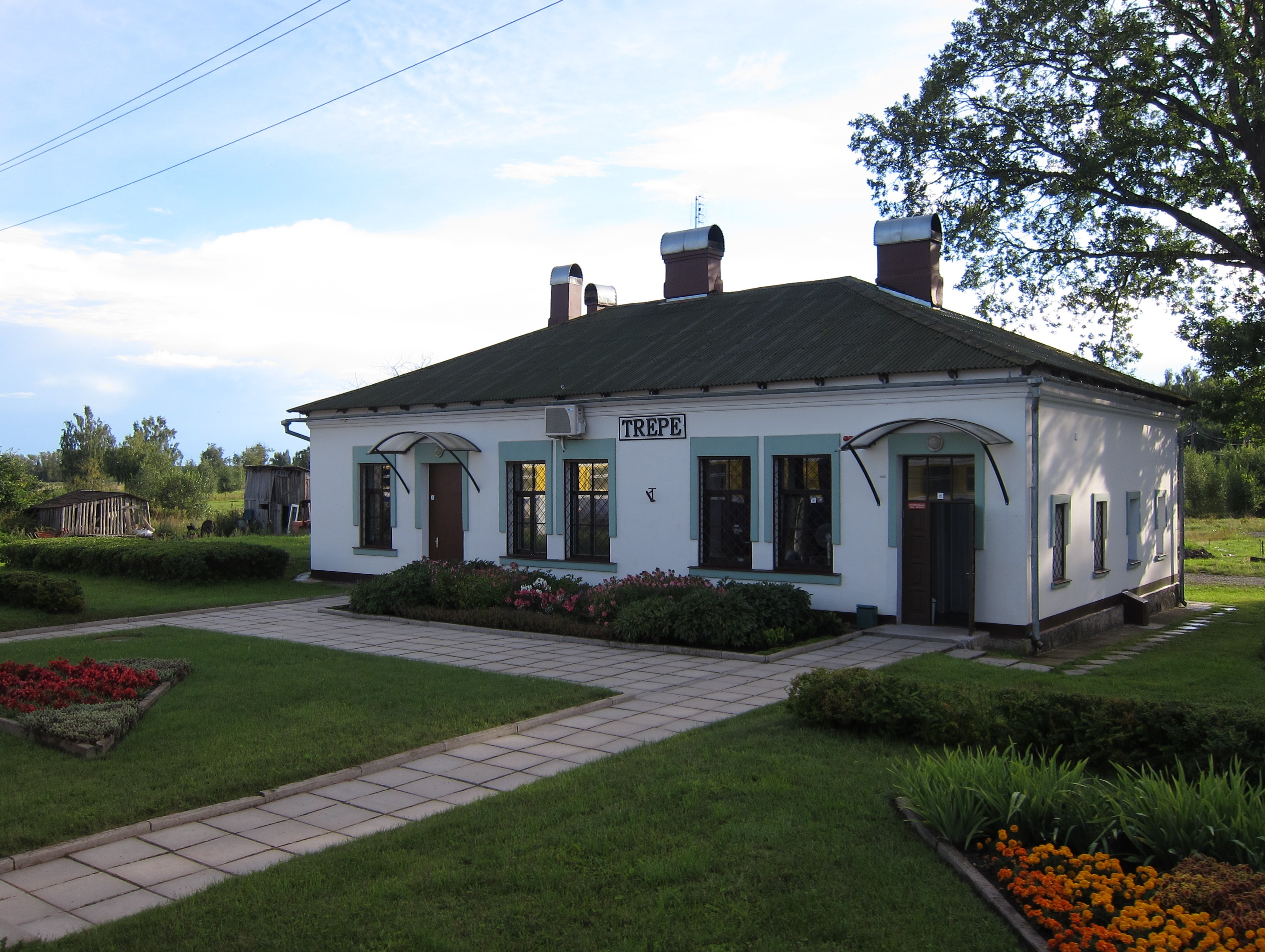 Пассажирское здание станции Трепе